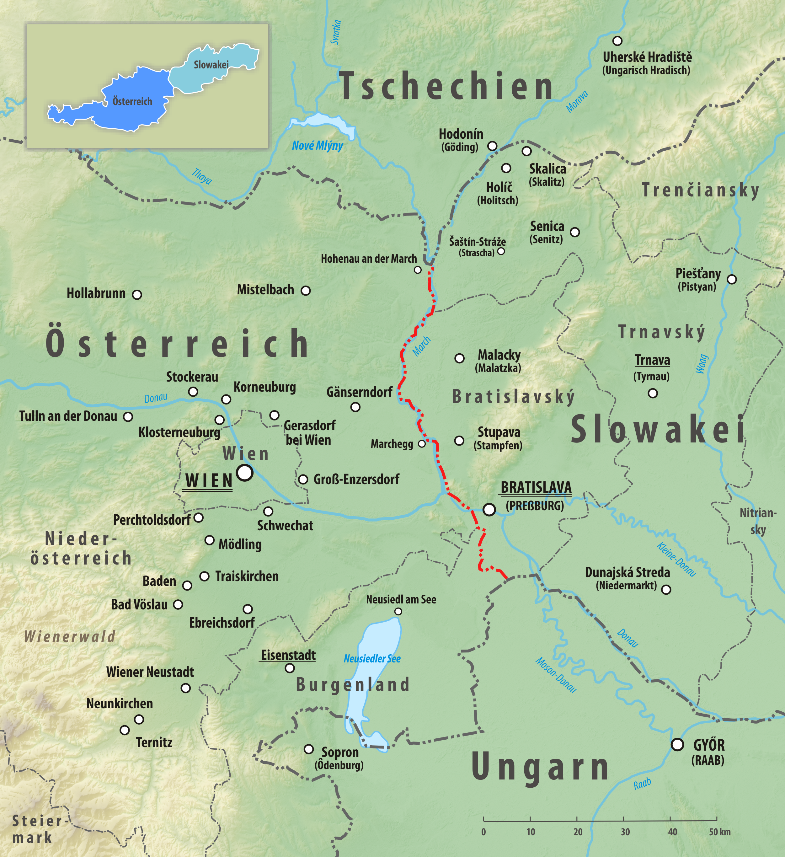 Reliefkarte des Grenzverlaufes zwischen Österreich und der Slowakei Topographischer Hintergrund: NASA Shuttle Radar Topography Mission (public domain). SRTM3 v.2.